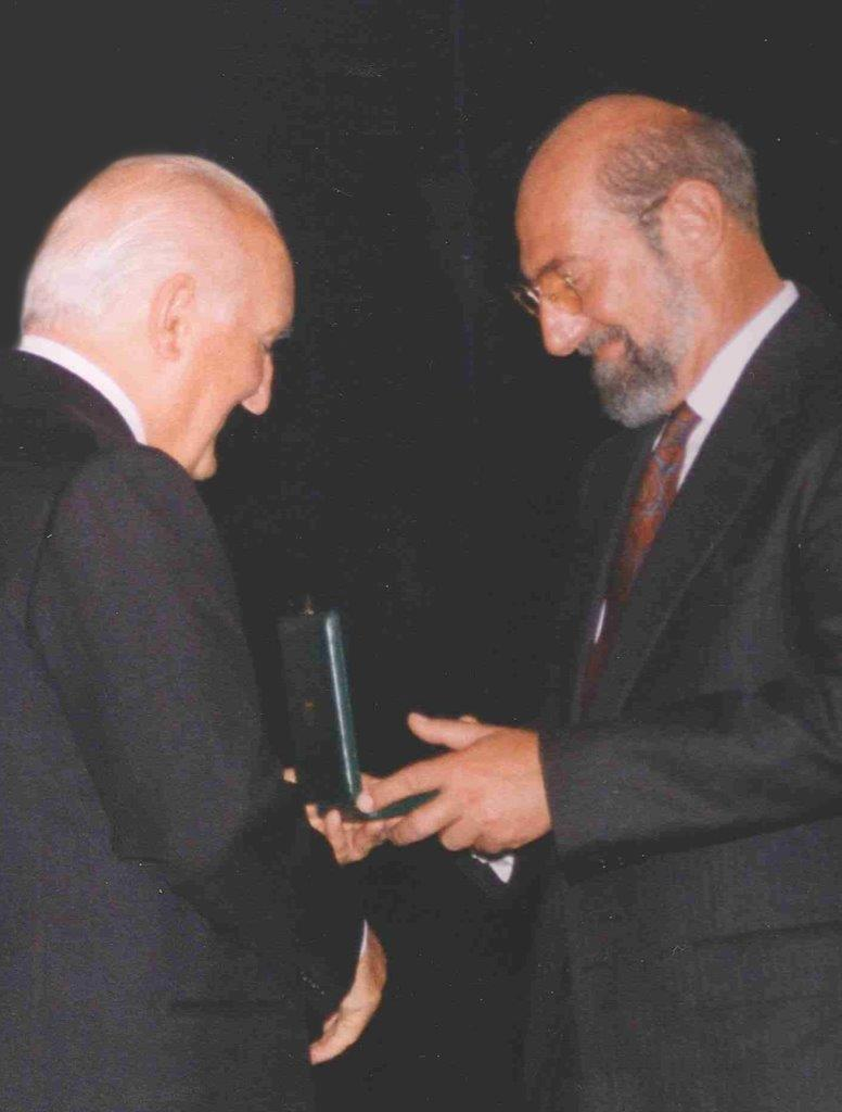 la foto ritrae Giuseppe Giuffrè, attuale d.g.